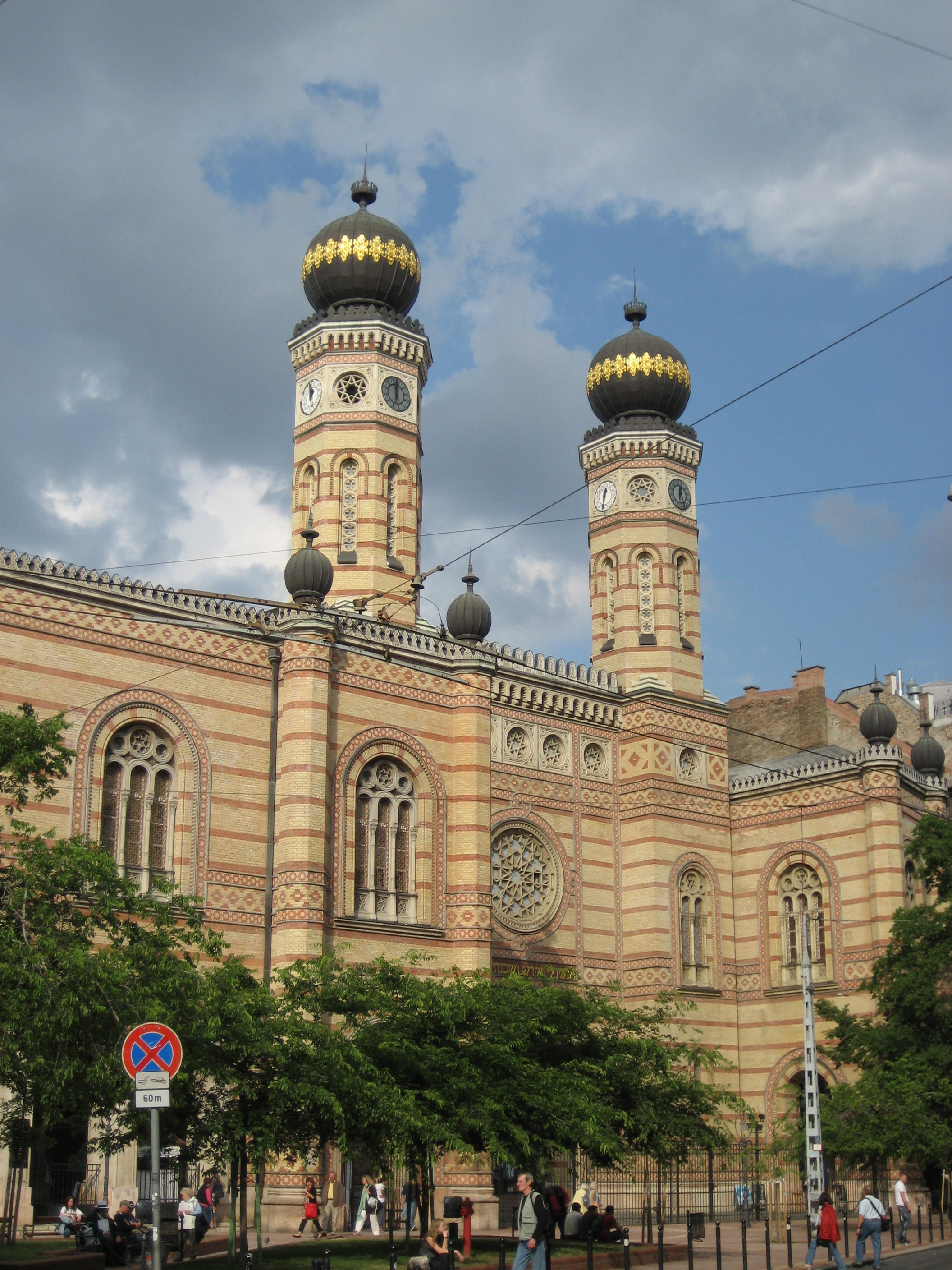 Große Synagoge in der Dohány utca, Budapest, Ungarn